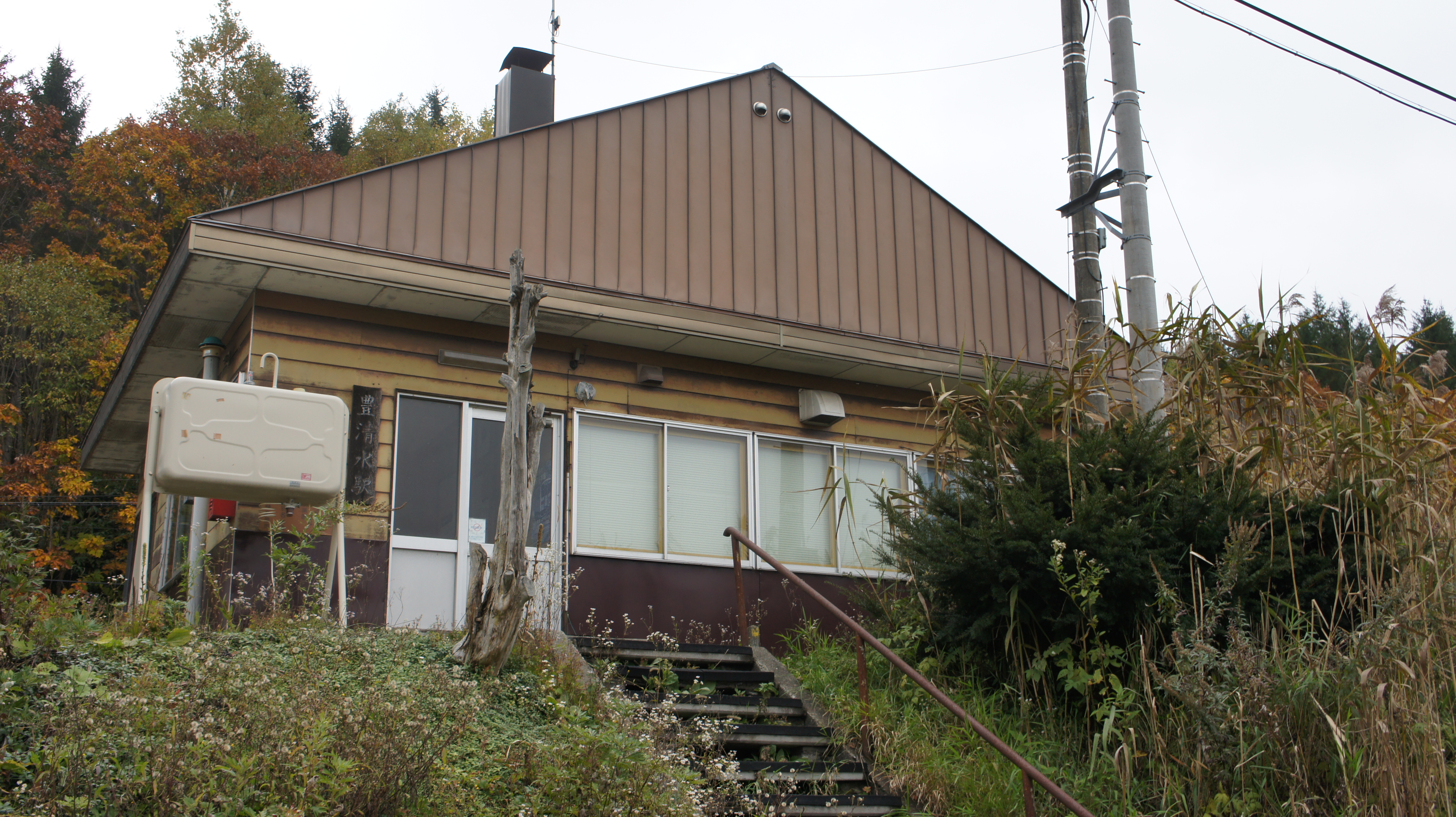 JR宗谷本線・豊清水駅の駅前通り側駅舎 Sony NEX-3